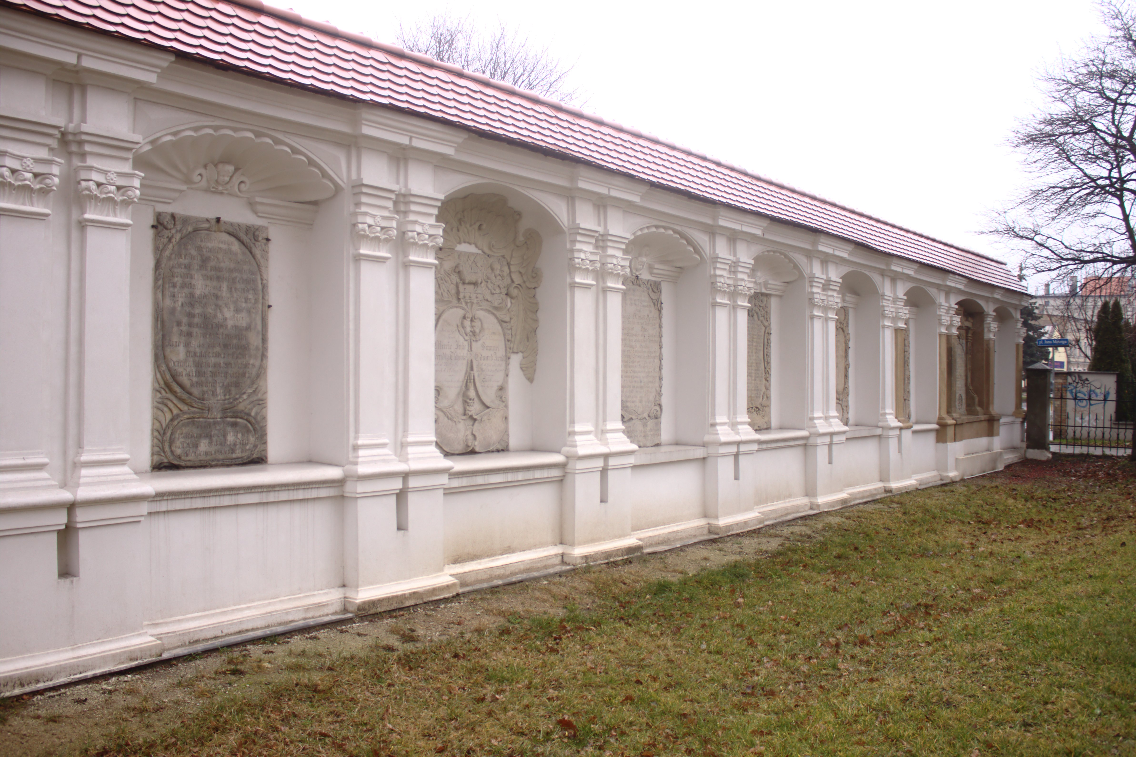 Kostel svatého kříže, náhrobky ve městě Leszno, Polsko